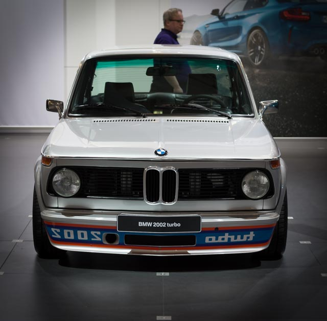 Die Abbildung zeigt einen weißen BMW 2002 Turbo, selbstaufgenommen anlässlich der Technoclassica 2016 in Essen.